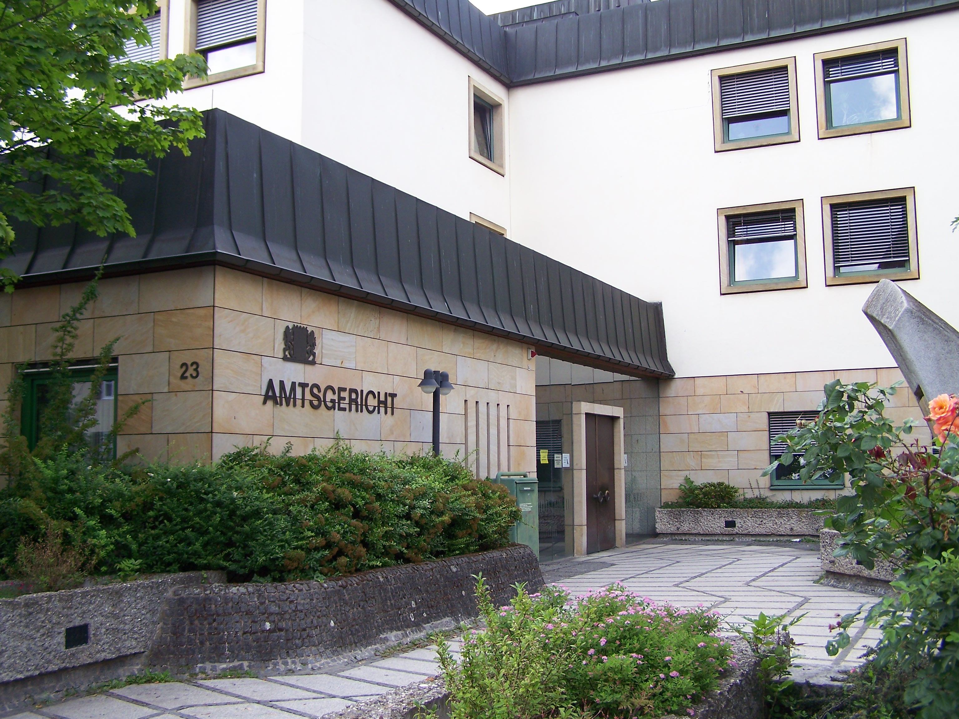 Das Bild stellt den Eingang des Amtsgerichts Erlangen dar.